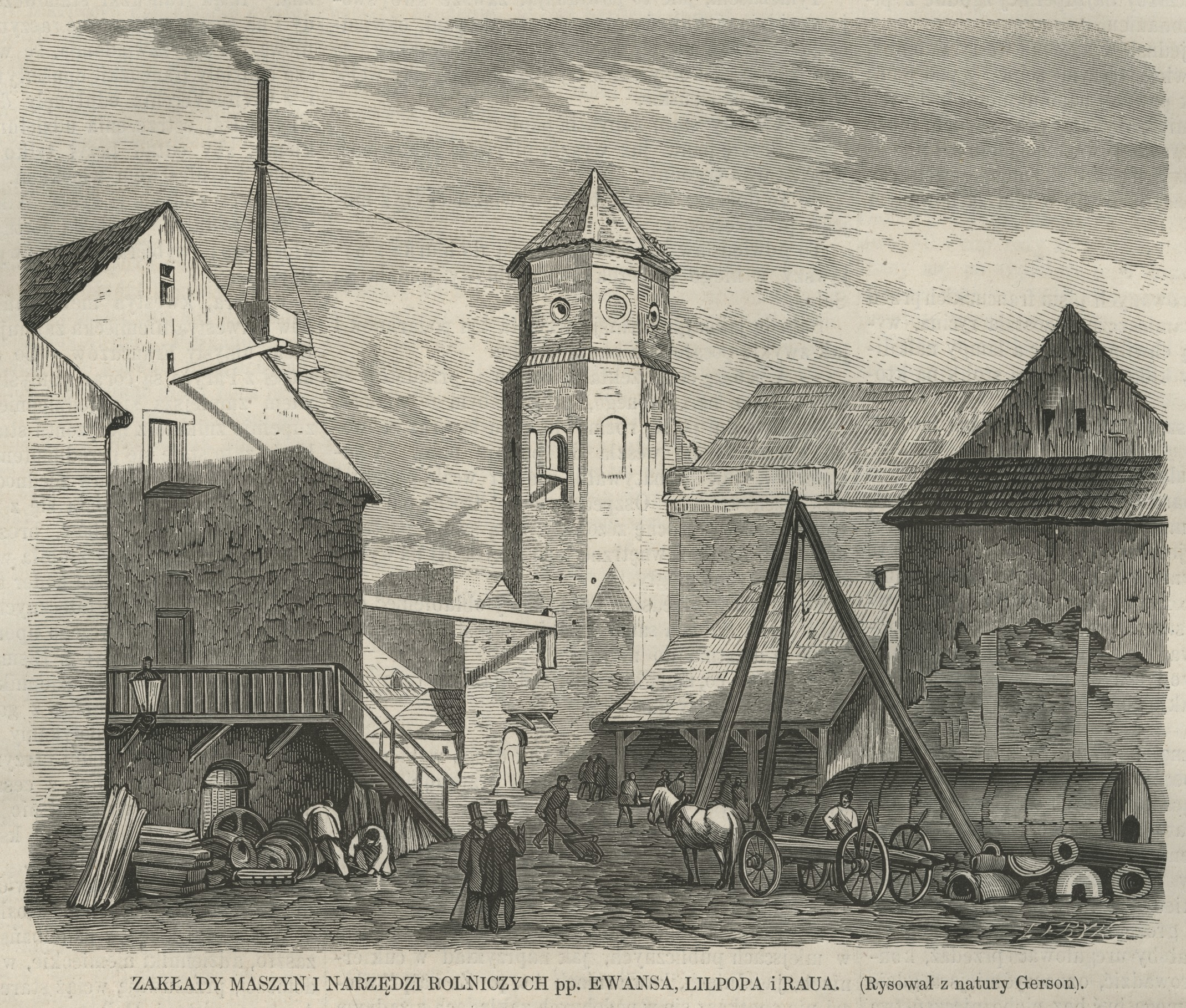 Zakłady maszyn i narzędzi rolniczych pp. Ewansa, Lilpopa i Raua : (Rysował z natury Gerson)